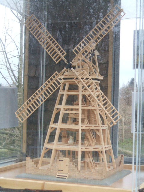 Modell der Mahnkeschen Mühle im Tierpark Stralsund.